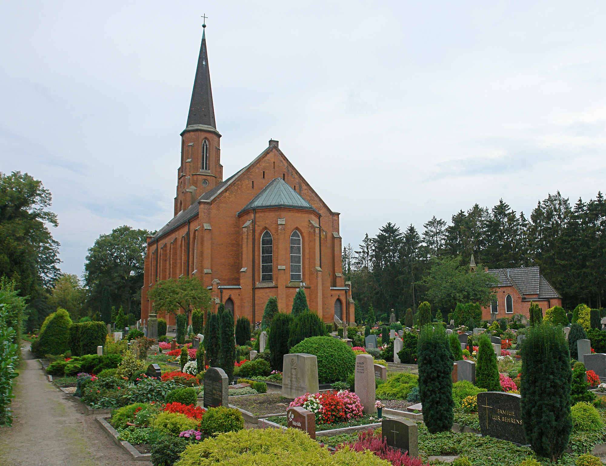 Kirche St. Johann mit Friedhofskapelle in Bremen, Oberneulander Landstraße 37, 41.Die Gesamtanlage ist ein geschütztes Kulturdenkmal in der Freien Hansestadt Bremen, mit der Nr. 1342 beim Landesamt für Denkmalpflege registriert.